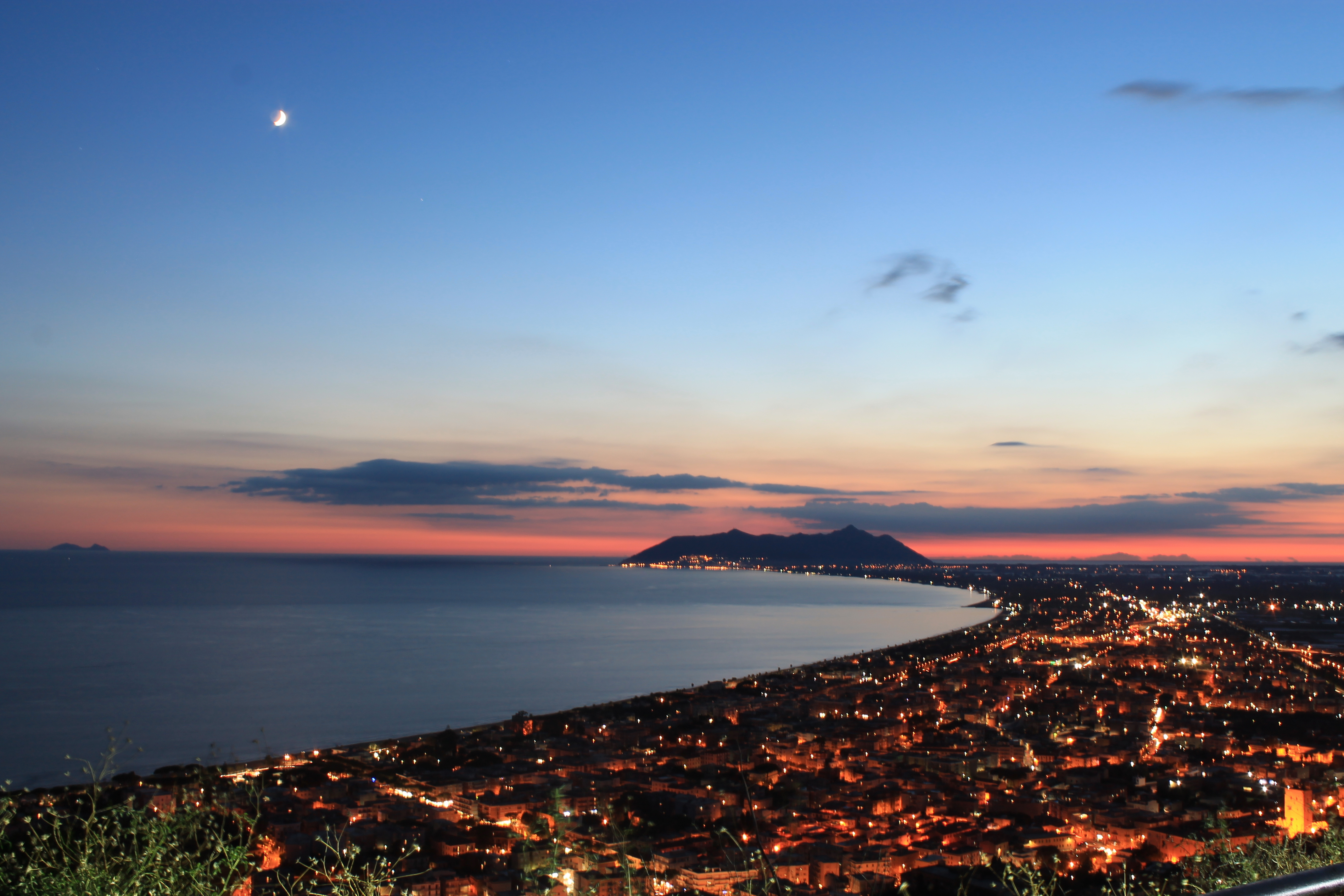 Monte Sant'Angelo (veduta d'insieme) This is a photo of a monument which is part of cultural heritage of Italy.